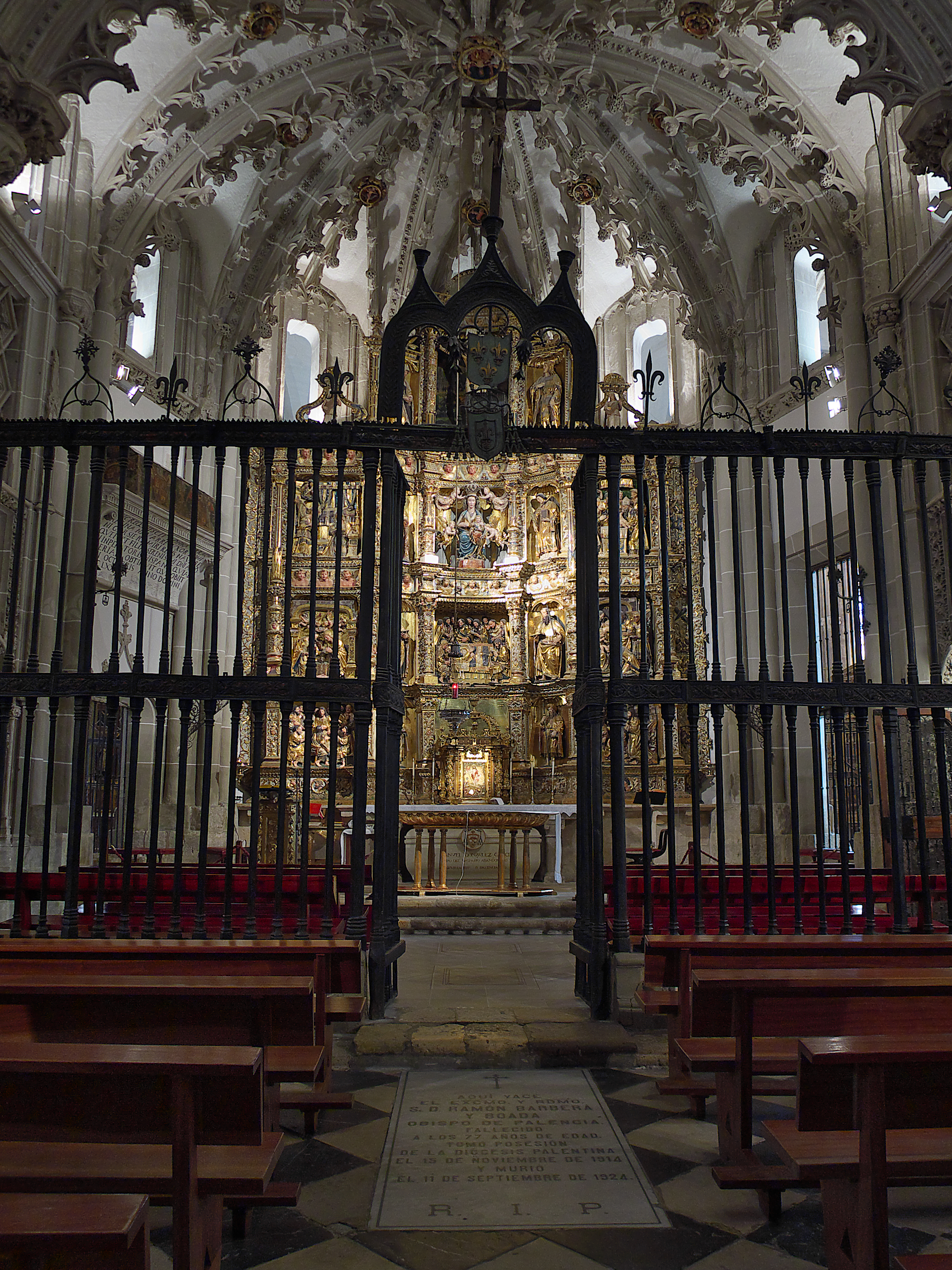 Primitiva capilla mayor de la catedral. Muy valorada por su interesante ejecución y decoración, sus dos alturas, rejas, falsa bóveda, sepulturas, retablo, esculturas, etc. Es atribuída al maestro mayor de la catedral, maestre Issanbart (o Hisambret, Ysamber, Ysambarte), activo en Palencia hacia 1424.